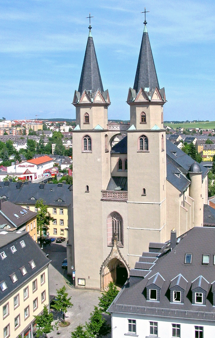 Die St. Michaeliskirche in Hof (Saale)vom Rathausturm aus